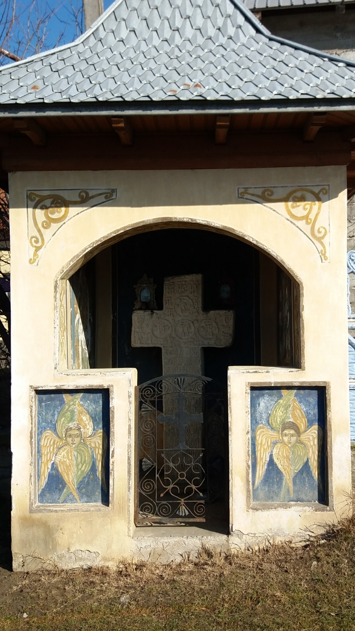 Unul dintre cele mai vechi monumente istorice din comuna Albestii de Arges.